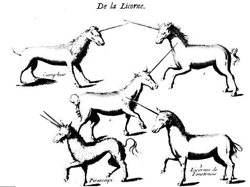 Le botaniste Pierre Pomet (1658-1699) mentionne cinq espèces de licornes, parmi lesquelles le Pirassouppi et le Camphur, en tête du chapitre sur la licorne de son Histoire générale des drogues.